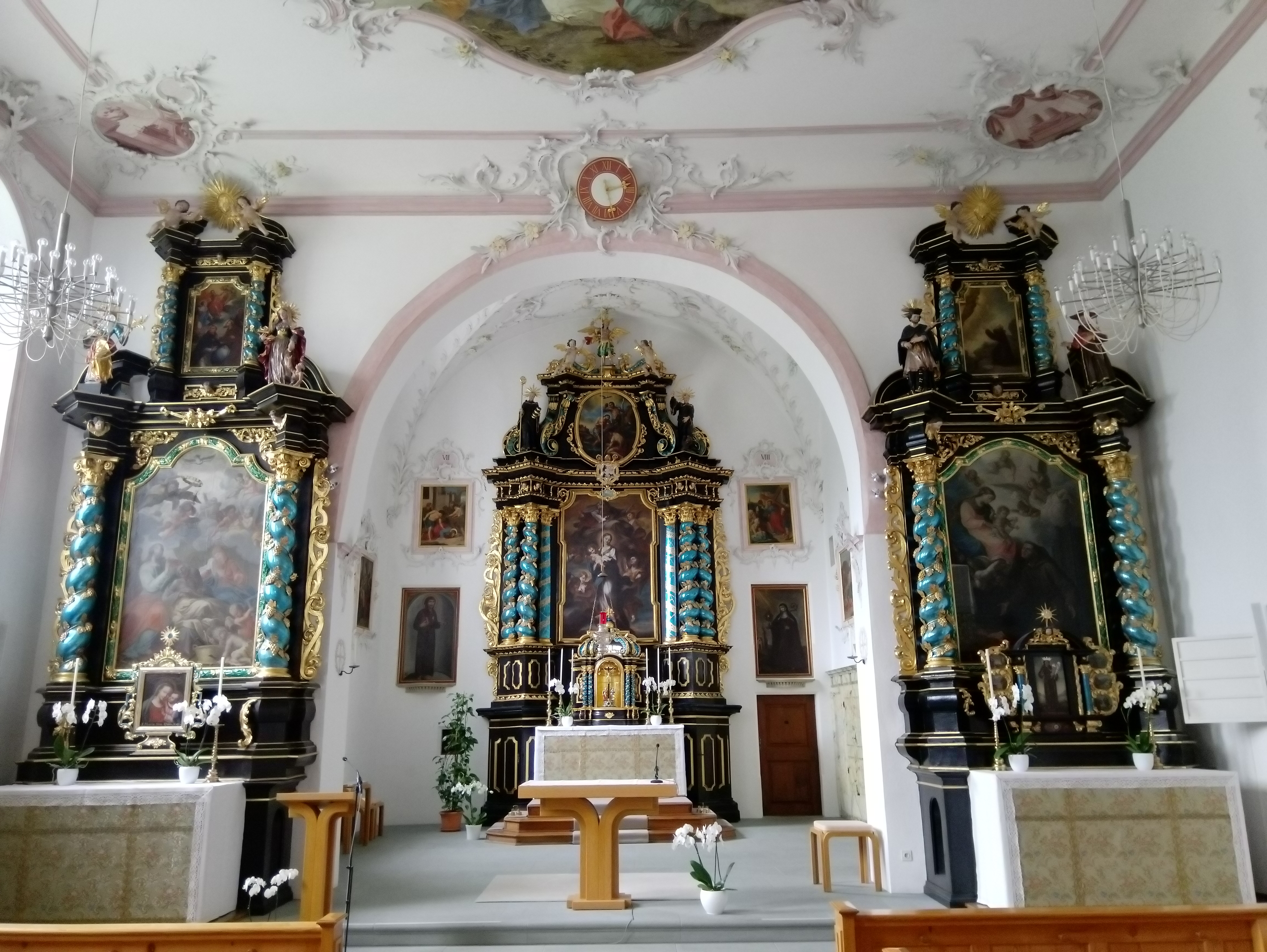 Barocke Altäre der Kirche des Klosters Notkersegg (Kloster Maria vom Guten Rat) in St. Gallen